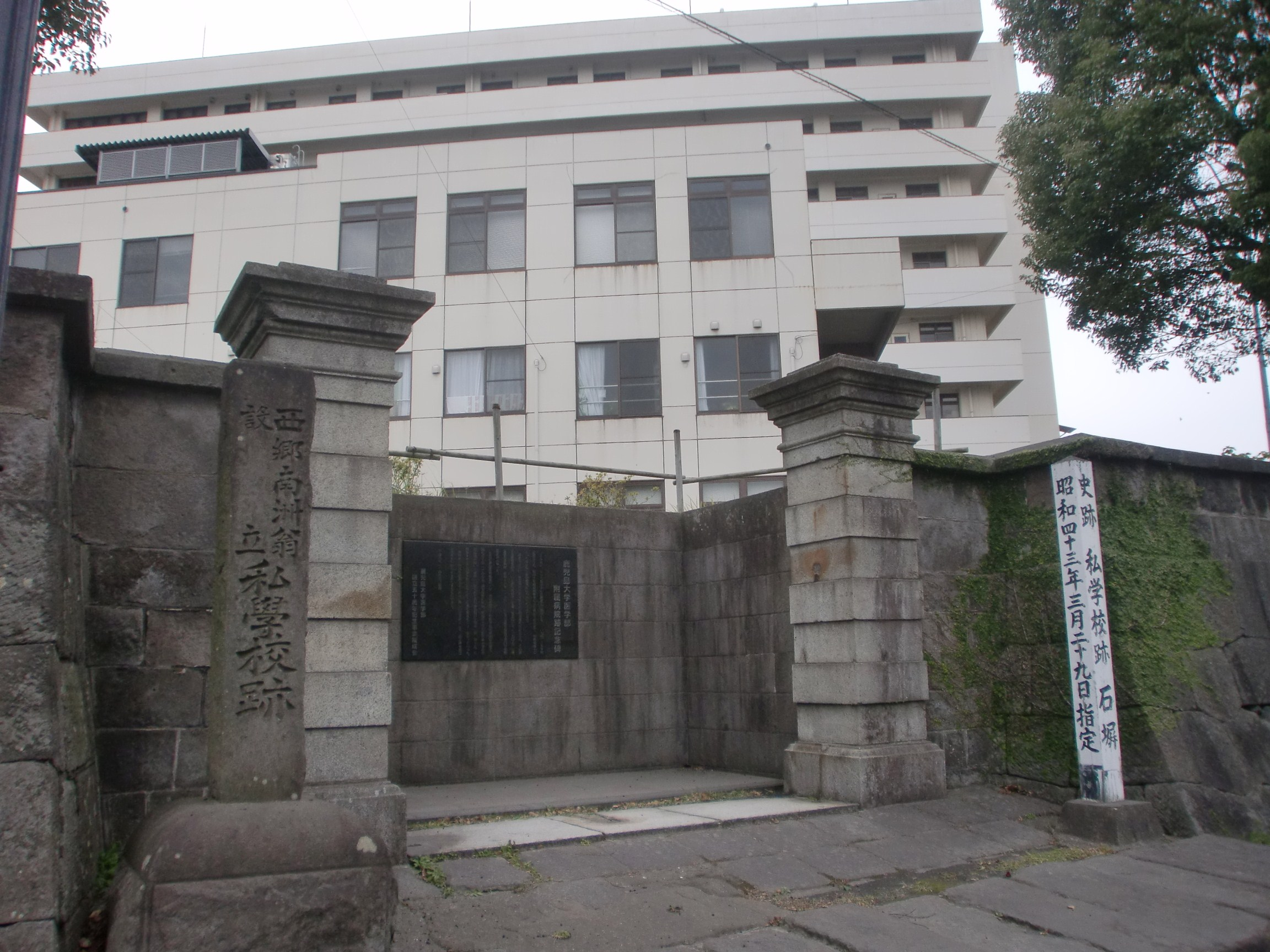 鹿児島県鹿児島市にある私学校の正門跡。